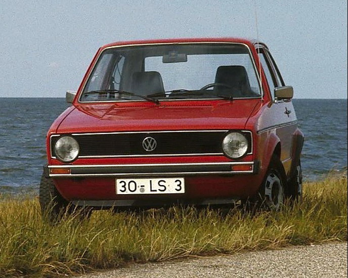 VW Golf I, Baujahr 1974 am Ijsselmeer in Holland licence plate garbled/changed